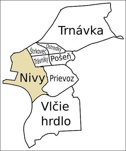 Nivy, Ružinov, Bratislava